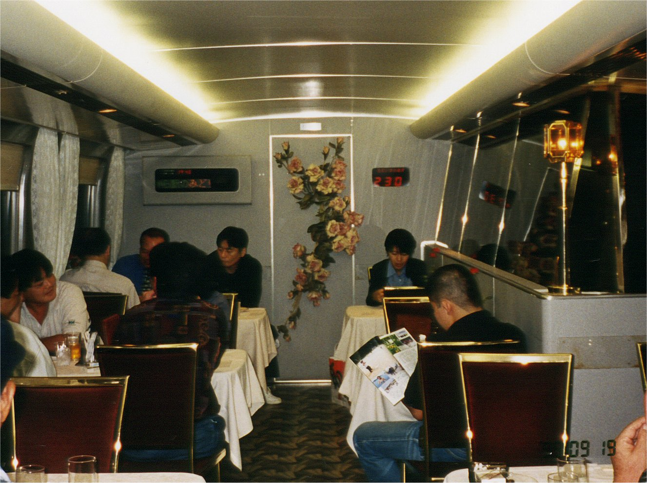 100系グランドひかり食堂車にて。